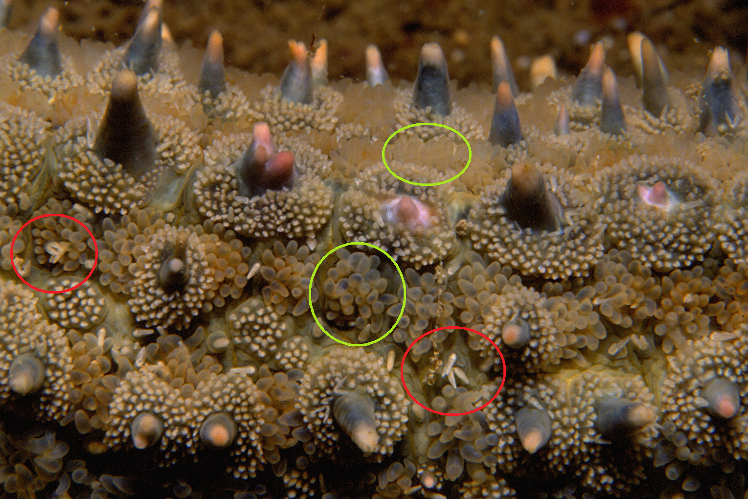 Marthasteria glacialis : sacs respiratoires. Tagged version by B kimmel